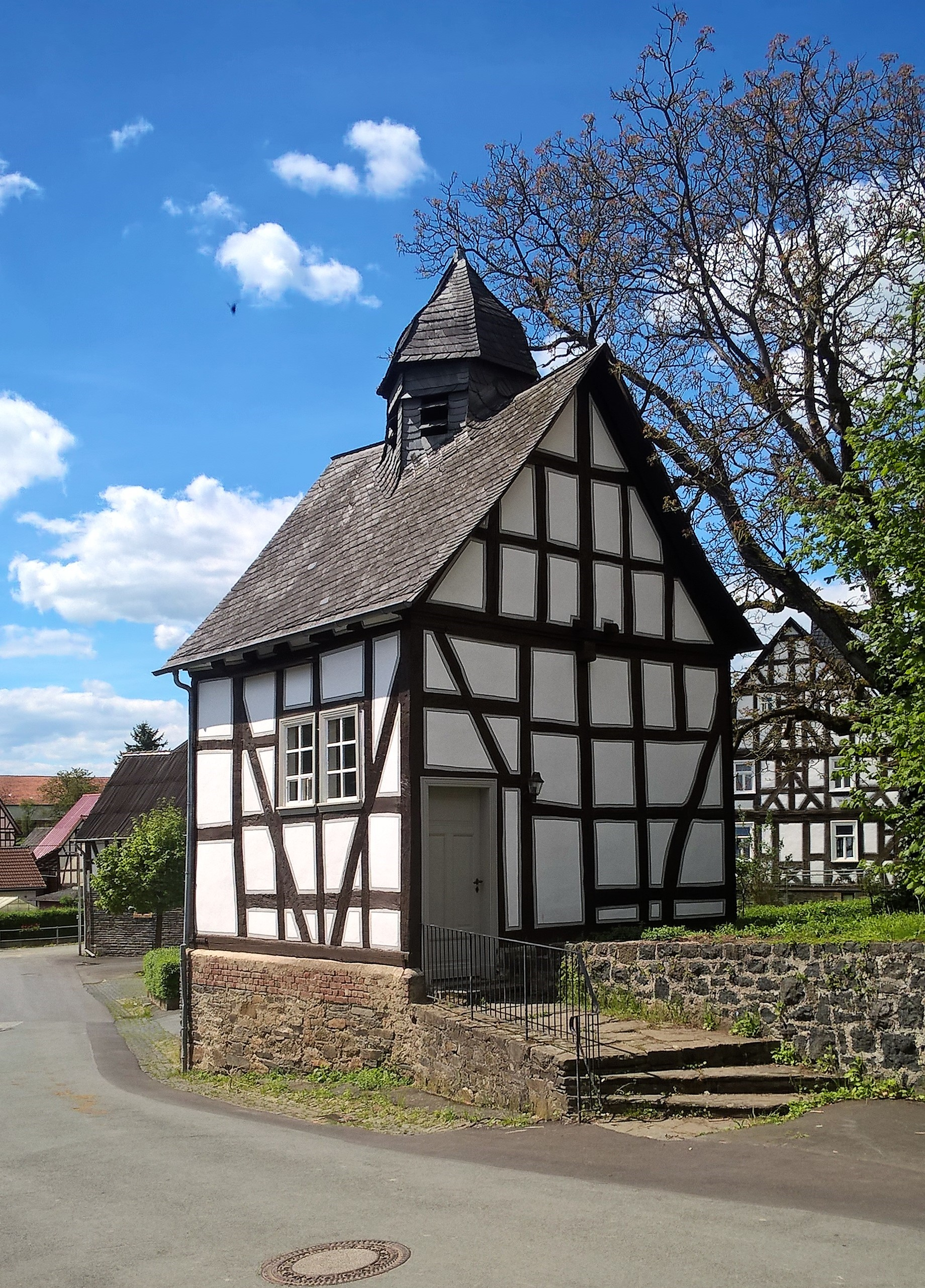 Evangelische Kirche Bellnhausen (Gladenbach), Landkreis Marburg-Biedenkopf, Hessen, Deutschland